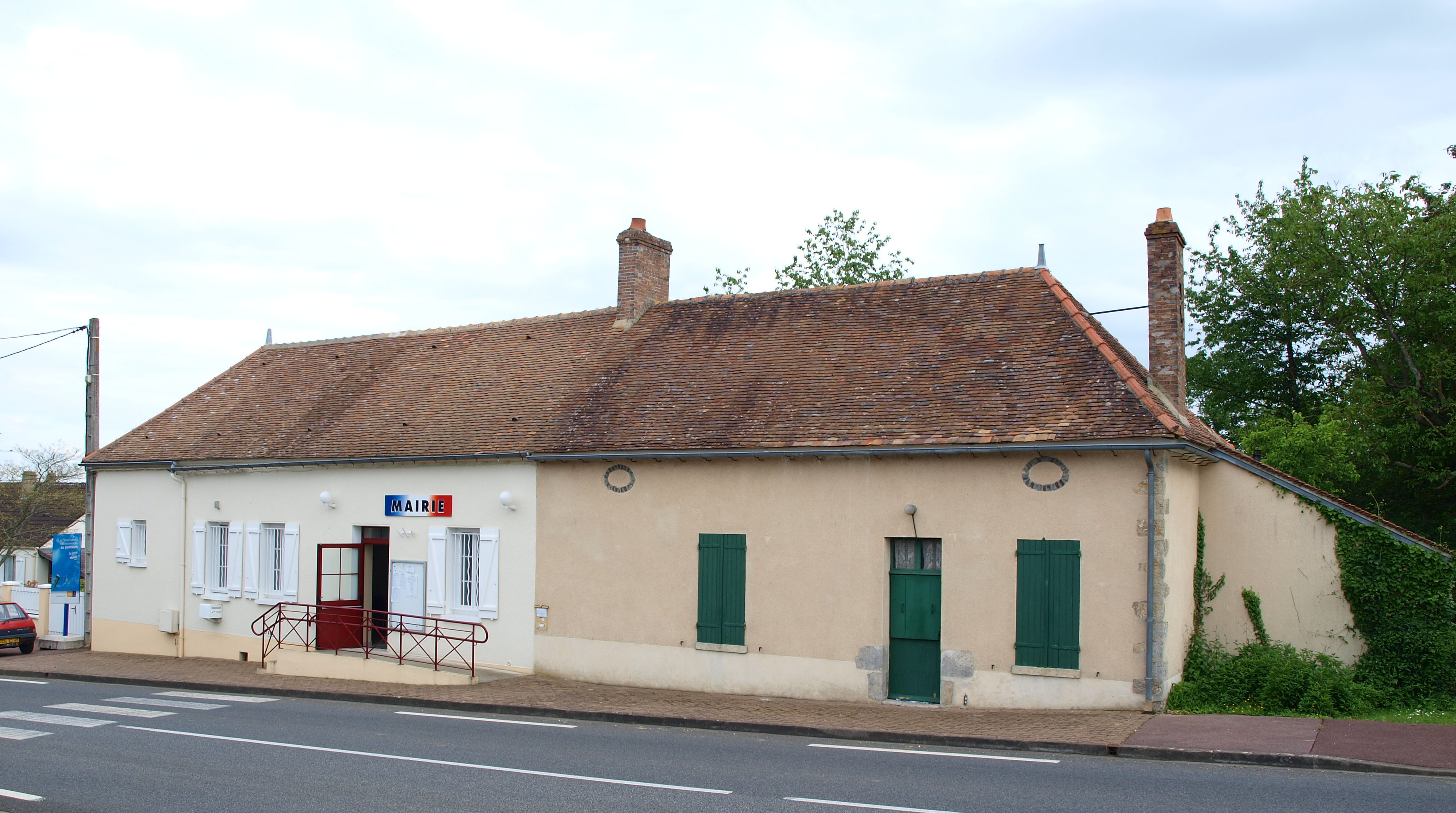 Saint-Loup-de-Gonois (Loiret, France) , mairie